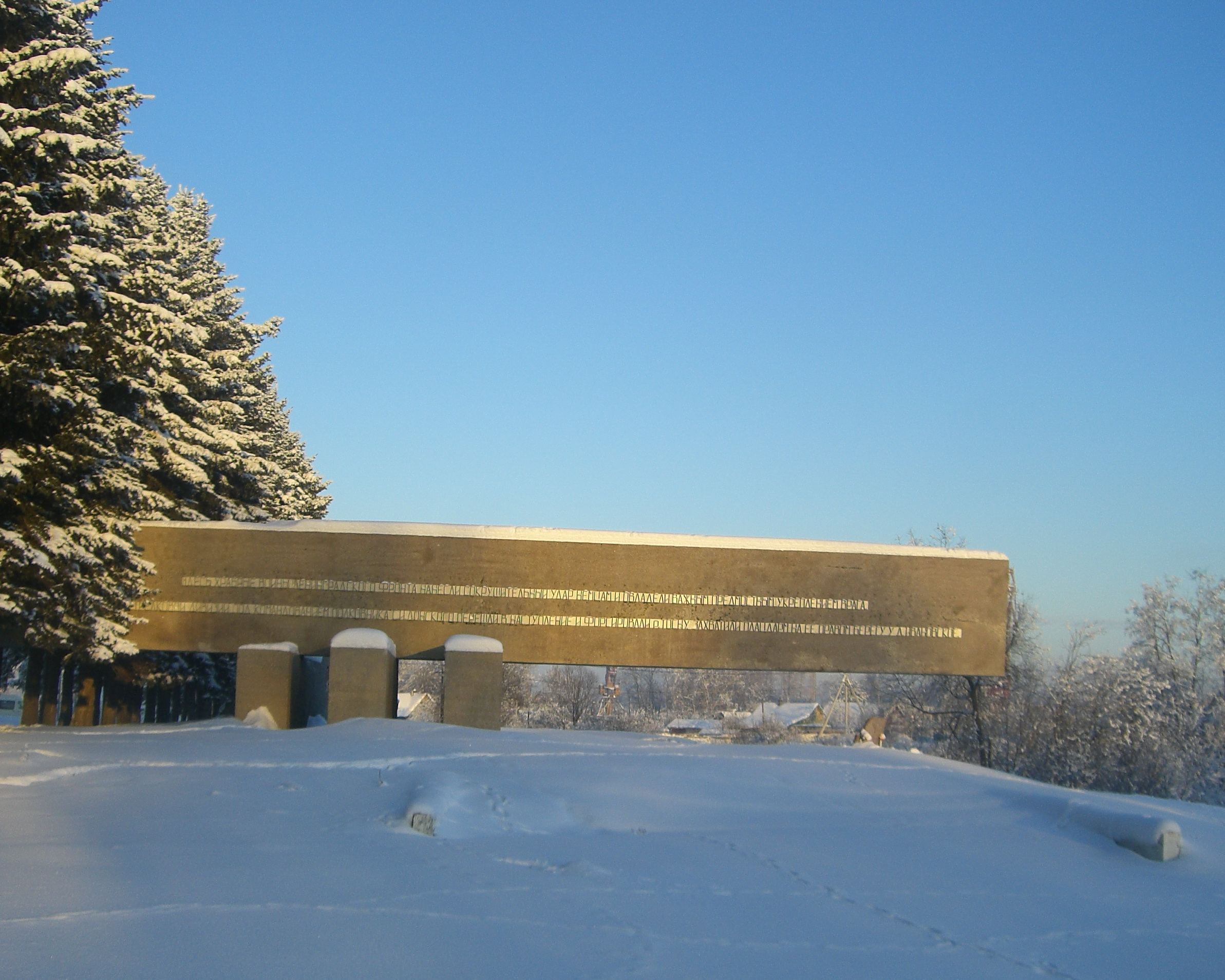 Мемориал "Невский порог" в городе Отрадное Ленинградской области. Стела.